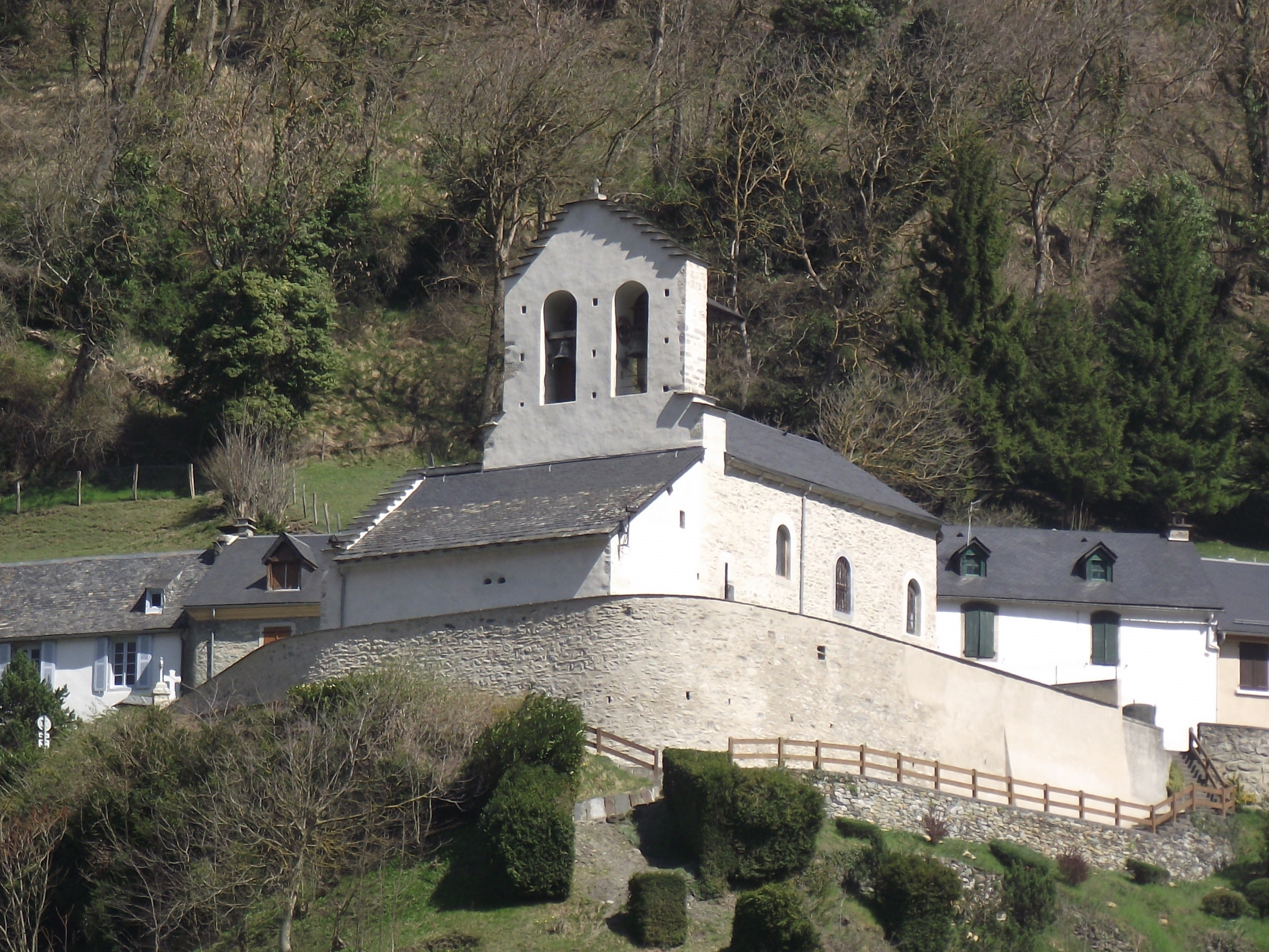 Église Saint-Pierre de Saligos (Hautes-Pyrénées, France)